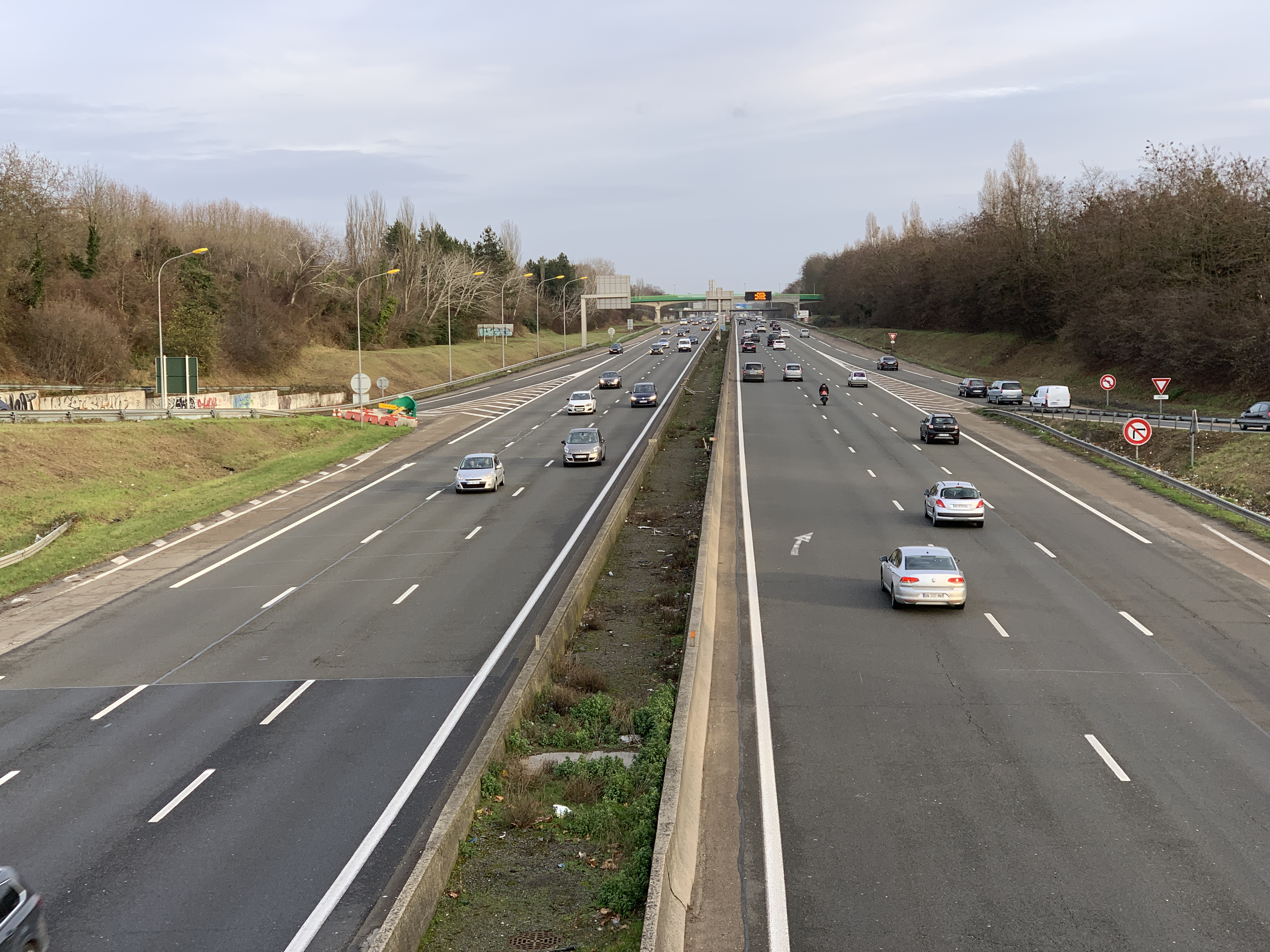 Autouroute A4 à Noisy-le-Grand.